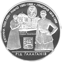 Монета рід Ґалаґанів реверс